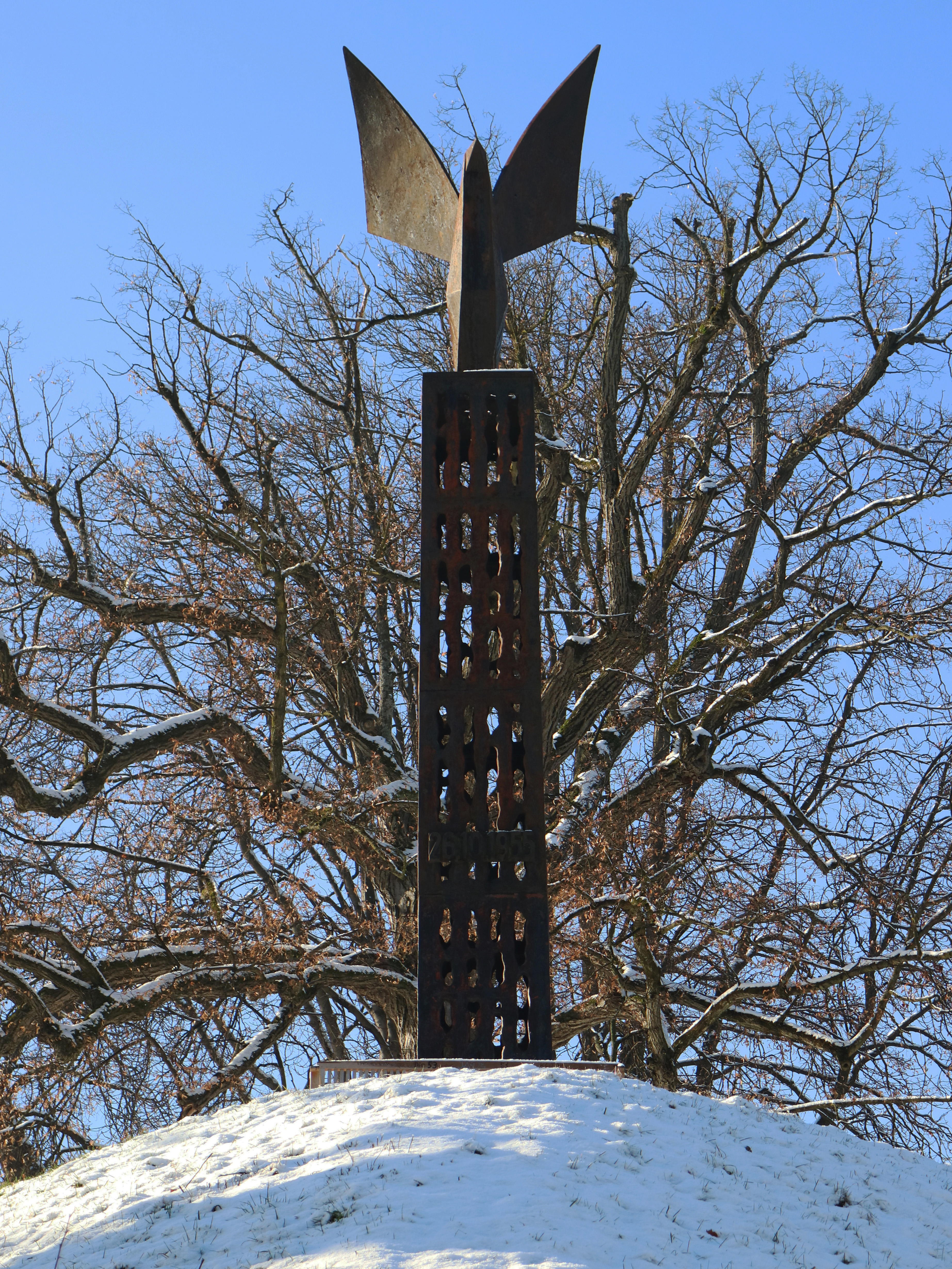 Befreiungsdenkmal von Wolfgang Skala (1960) im Grazer Burggarten